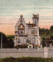 Haus der Alemannia Stuttgart (Ausschnitt aus einer Ansichtskarte).